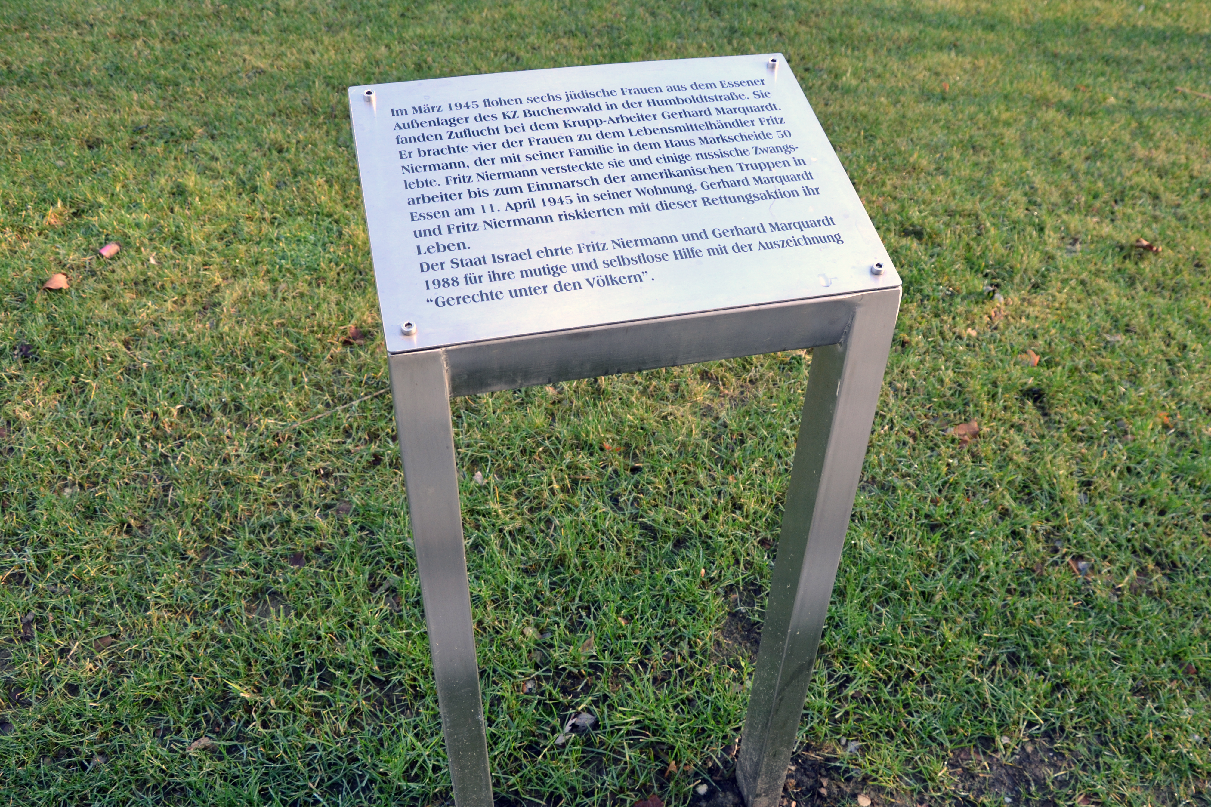 Gedenktafel der Stadt Essen an das ehemalige Haus Markscheide 50 in Essen-Altendorf, hier erhielten Flüchtlinge des KZ-Außenlager Humboldtstraße (Außenlager des KZ Buchenwald) in Essen-Fulerum Unterschlupf